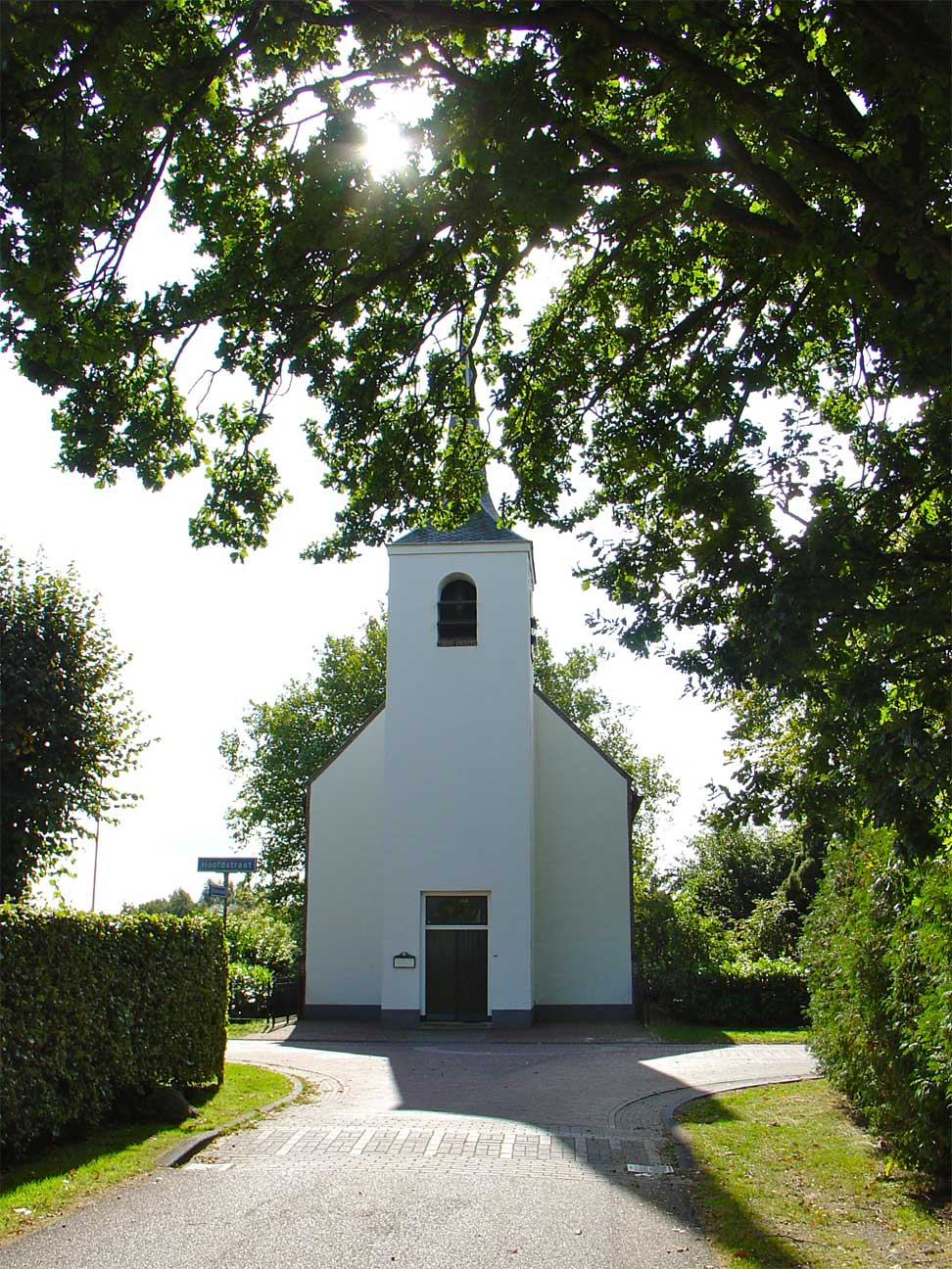 De Jacobskerk in Roderwolde